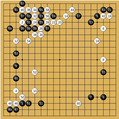 木谷 半目勝ち 高川